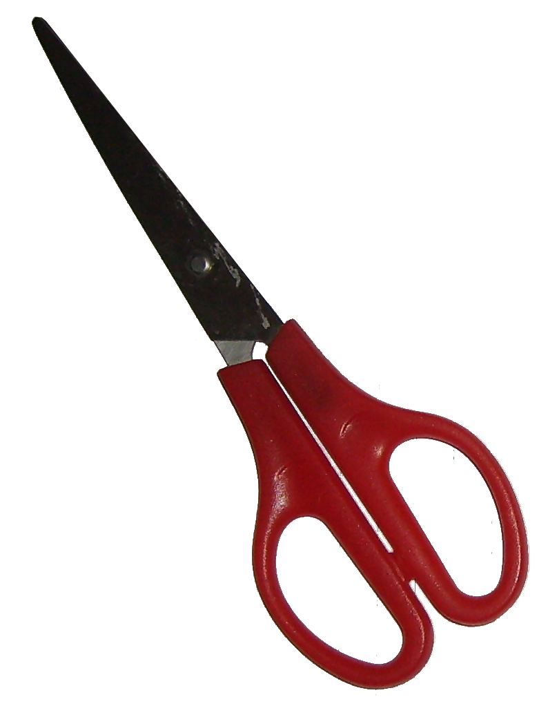 Ciseaux à papier rouge, détourés